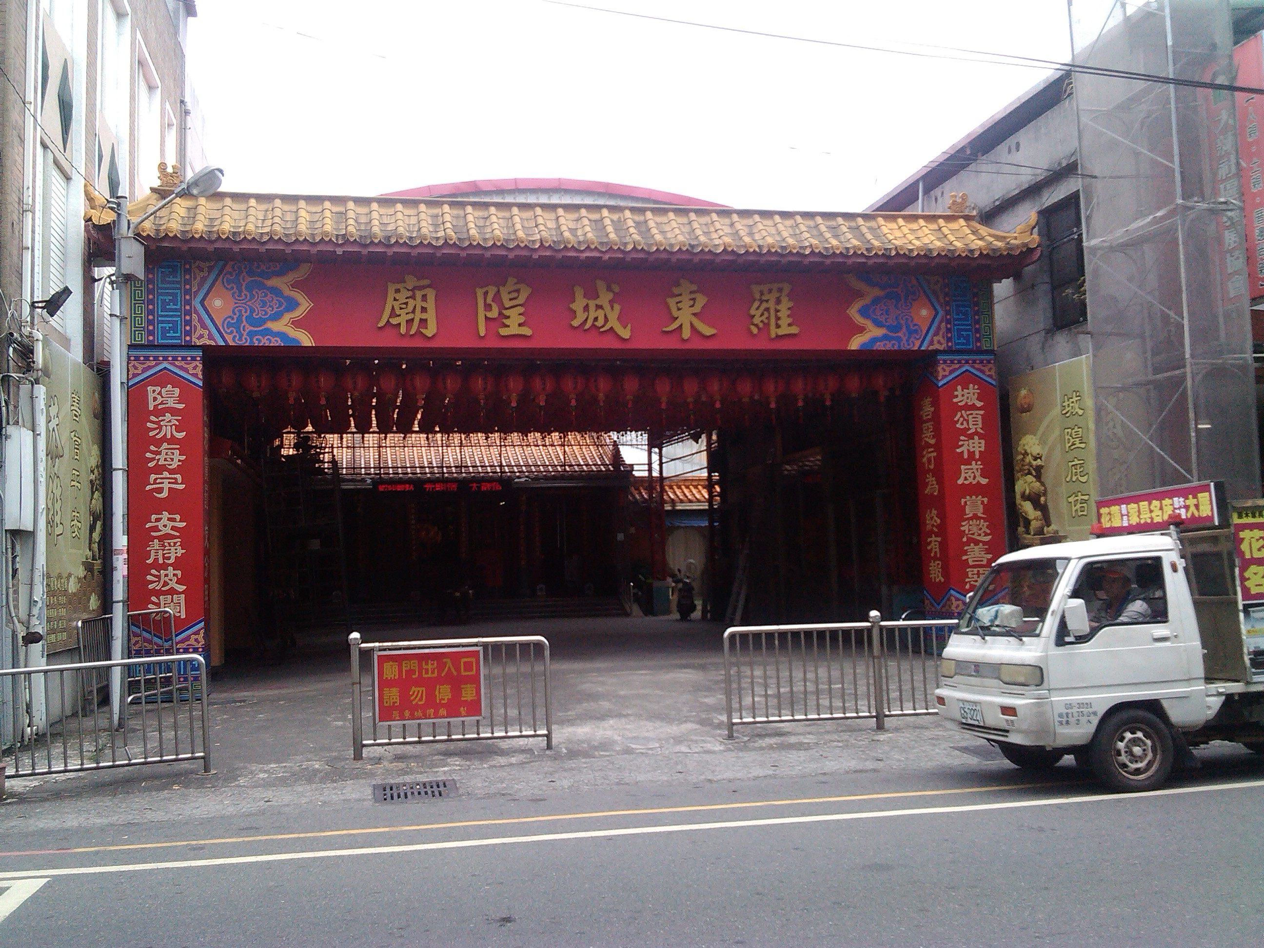 民生東路&中正路口